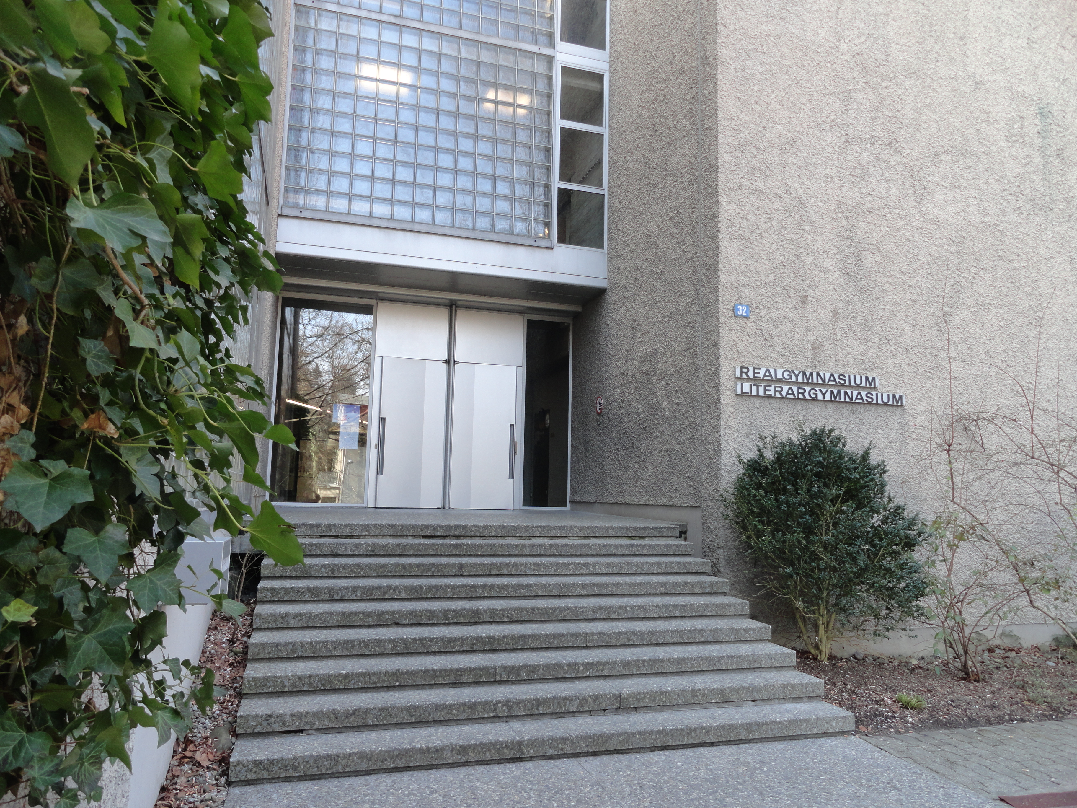 Kantonsschule Rämibühl Eingang Ostseite